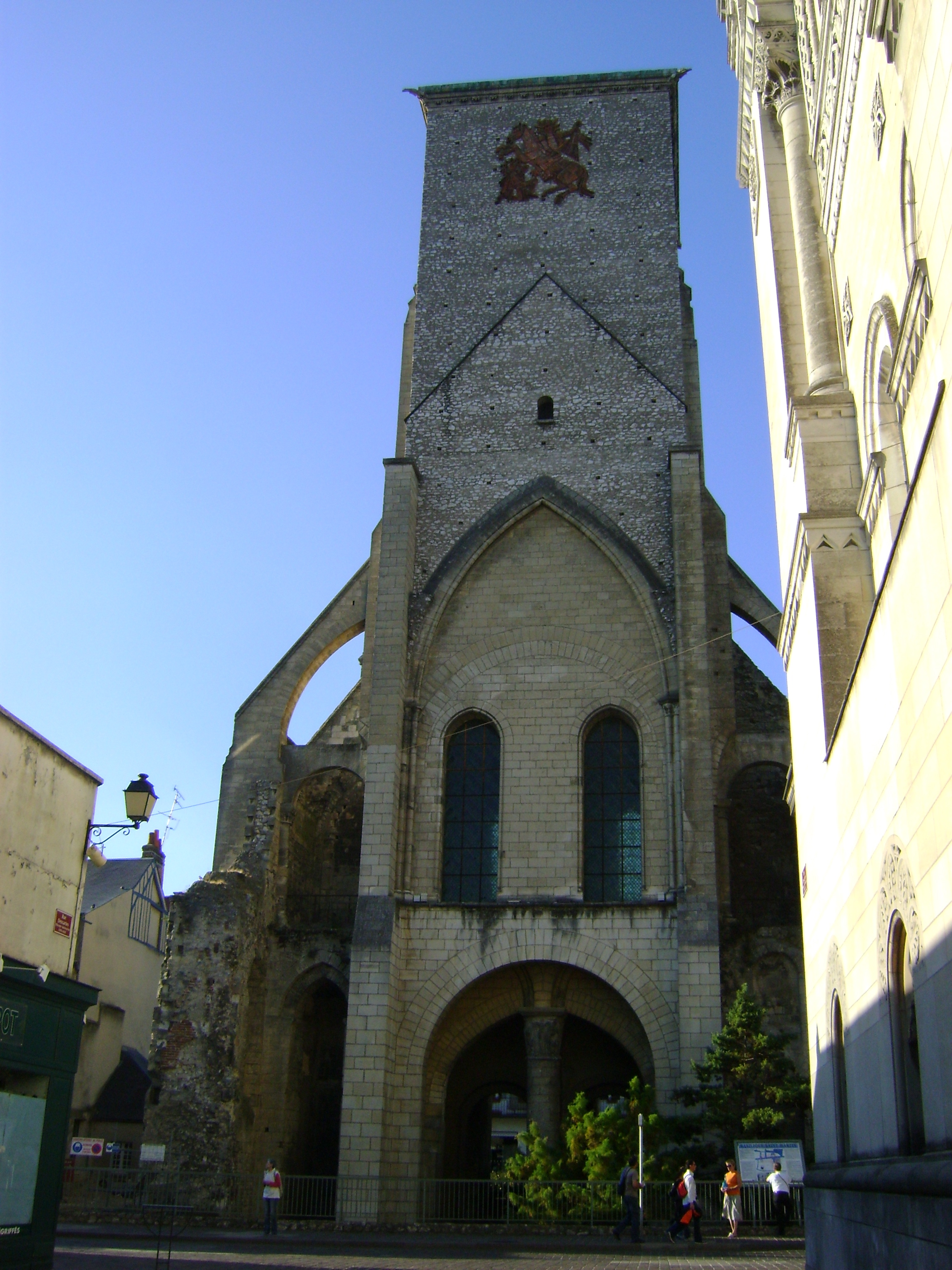 Ancienne abbaye de Saint-Martin, Tours, Indre-et-Loire. La Tour Charlemagne. .